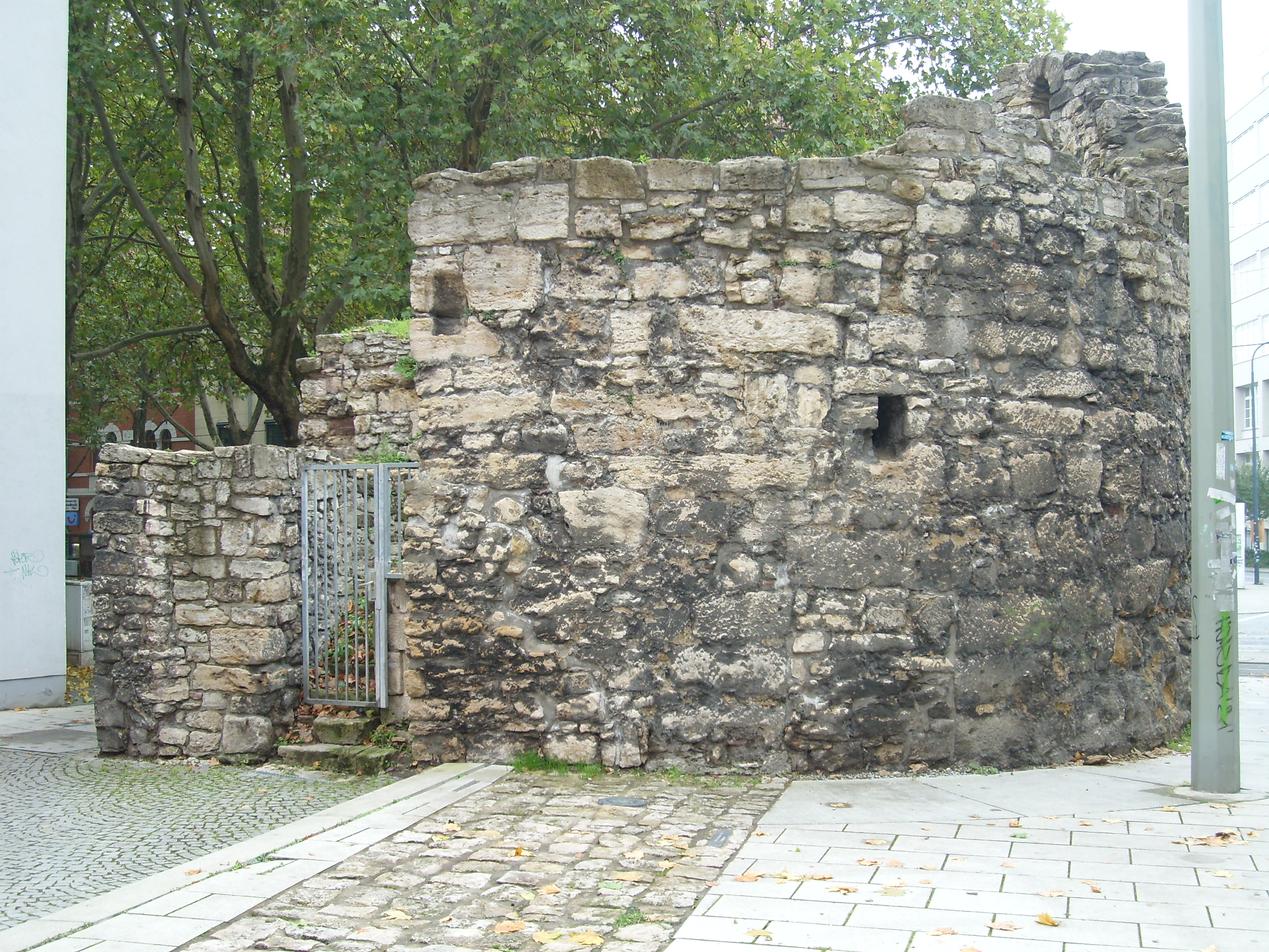 Rest der Stadtbefestigung Jenas: Der Anatomieturm